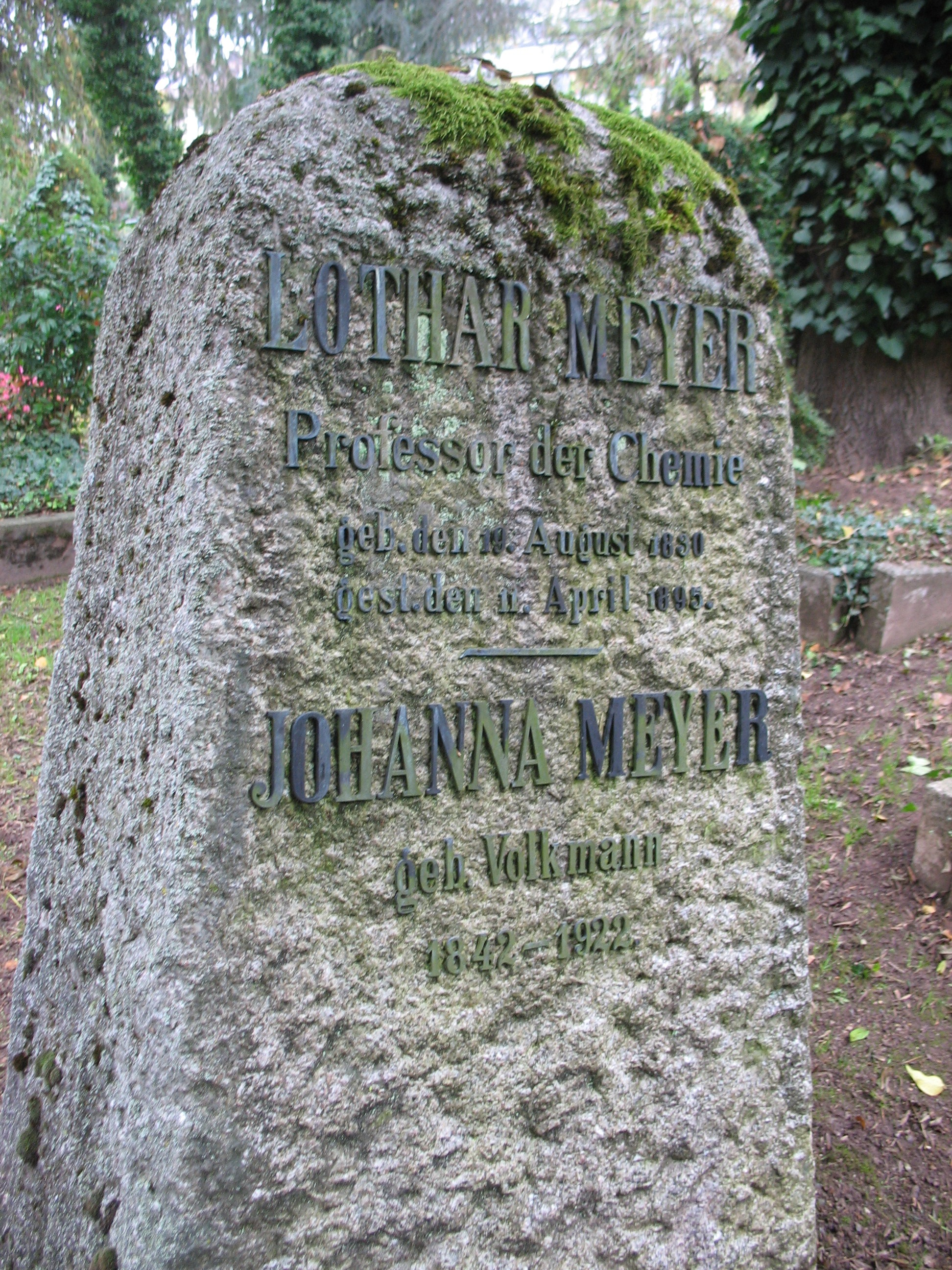 Grabstein